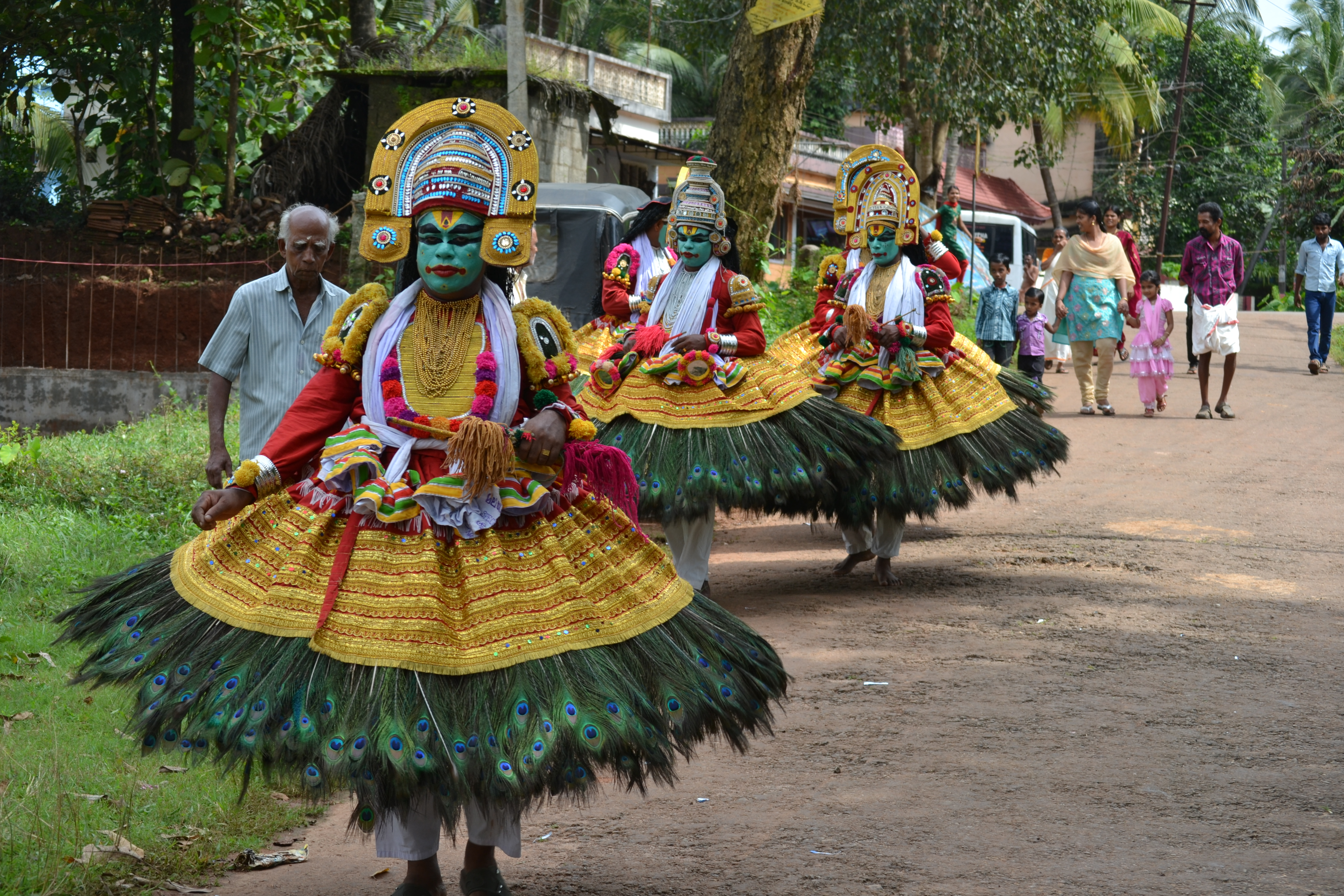 അർജ്ജുനനൃത്തം. ഊരകം കുമ്മാട്ടി മഹോത്സവത്തില്‍ നിന്ന് . മഹാഭാരത കഥയുമായി ബന്ധപ്പെട്ട ഈ കലാരൂപം, അനുരഞ്ജനകല, അനുഷ്ഠാനകല, ആയോധനകല, മയിൽപ്പീലിതൂക്കം എന്നീ പേരുകളിലും അറിയപ്പെടുന്നു. ദേവീ ക്ഷേത്രങ്ങളിൽ "തൂക്കം" എന്ന നേർച്ച ഉത്സവത്തിന്റെ ഭാഗമായിട്ടാണ് ഈ കലാരൂപം അവതരിപ്പിച്ച് വരുന്നത്‌